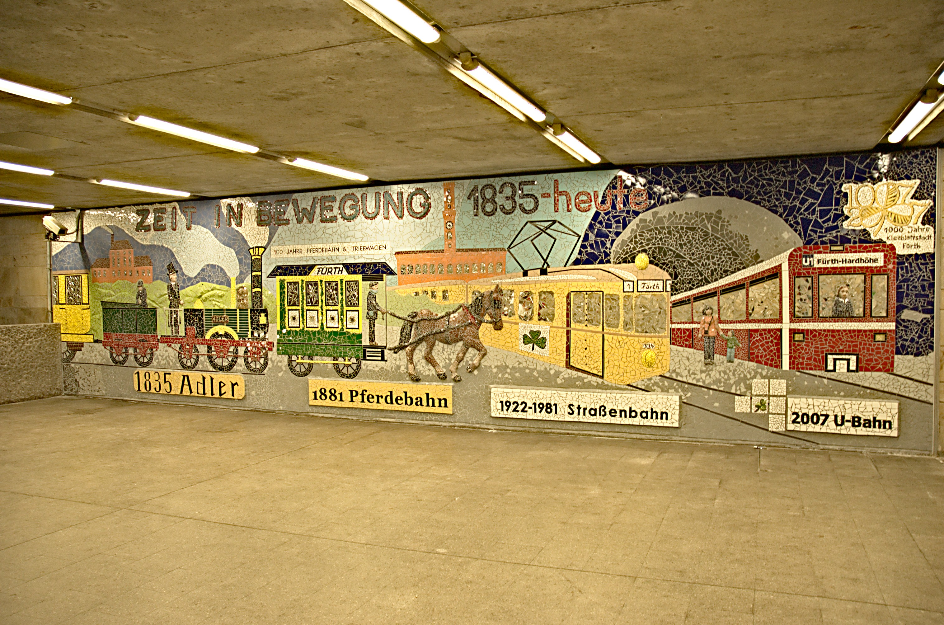 Mosaik in der Fürther U-Bahn-Station Jakobinenstraße